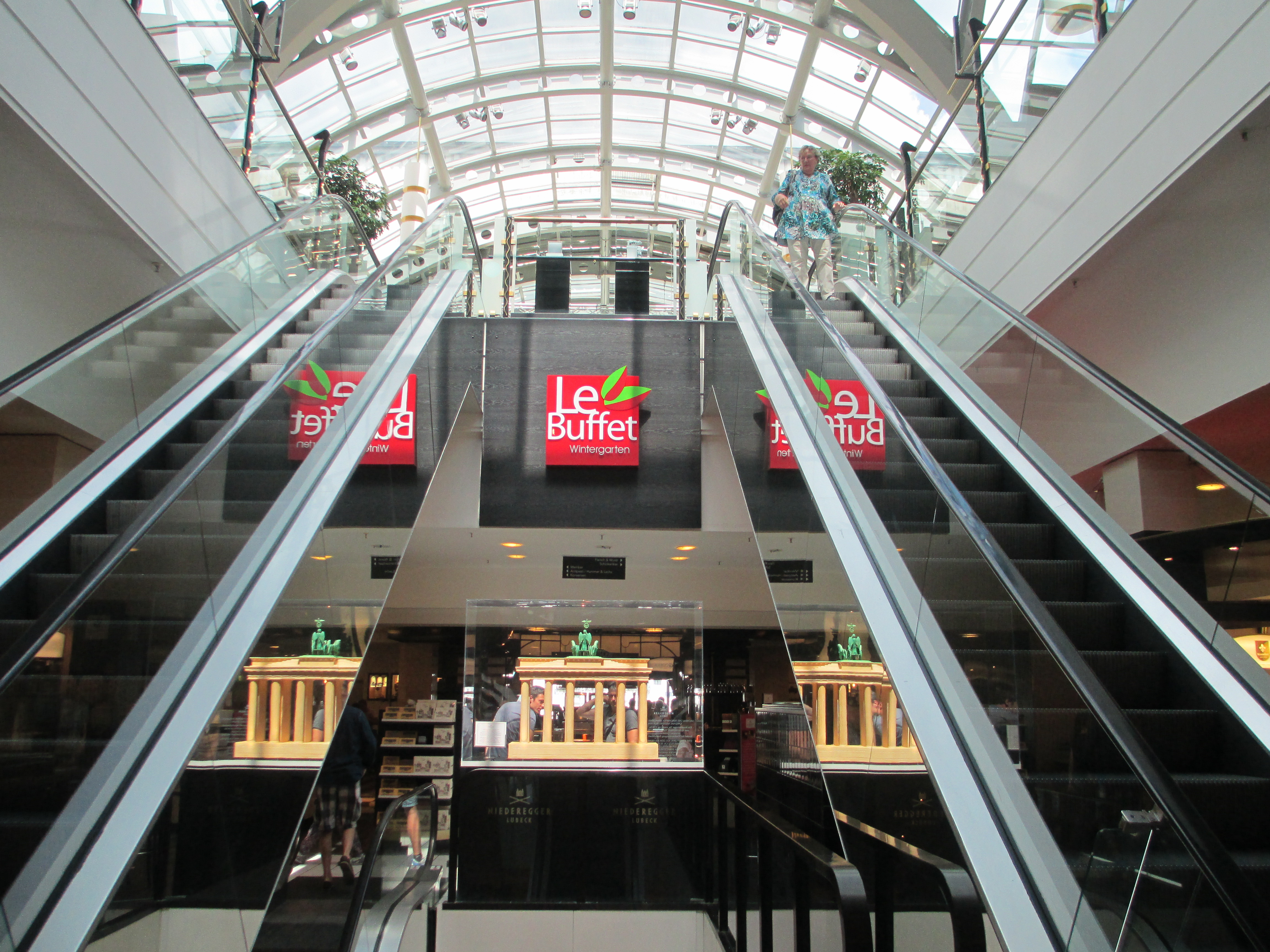 מדרגות נעות לקומה העליונה בקה דה וה